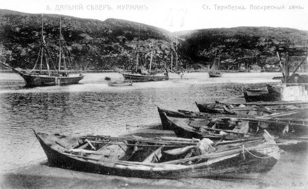 Дальний север. Мурман. Становище Териберка. Воскресный день. Почтовая открытка, начало 1900-х годов